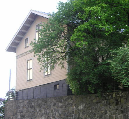 Eget bilde, tatt av Grotten ved slottet, norges æresbolig for kunstnere.